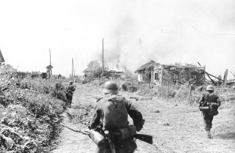 Männer der Vorausabteilung dringen in das von den Sowjets besetzte Dorf ein. Jedes Haus, jedes Gehöft muss von den sowjetischen Soldaten und Heckenschützen freigemacht werden. Prop-Kp. 637; Ort: Gatnoje - Datum 6.8.1941